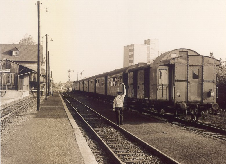 Rodgaubahn 1978 im Bahnhof Jügesheim Fotograf: Peter Karl, Rodgau, 1978 Lizenz: GNU-FDL erteilt 2003